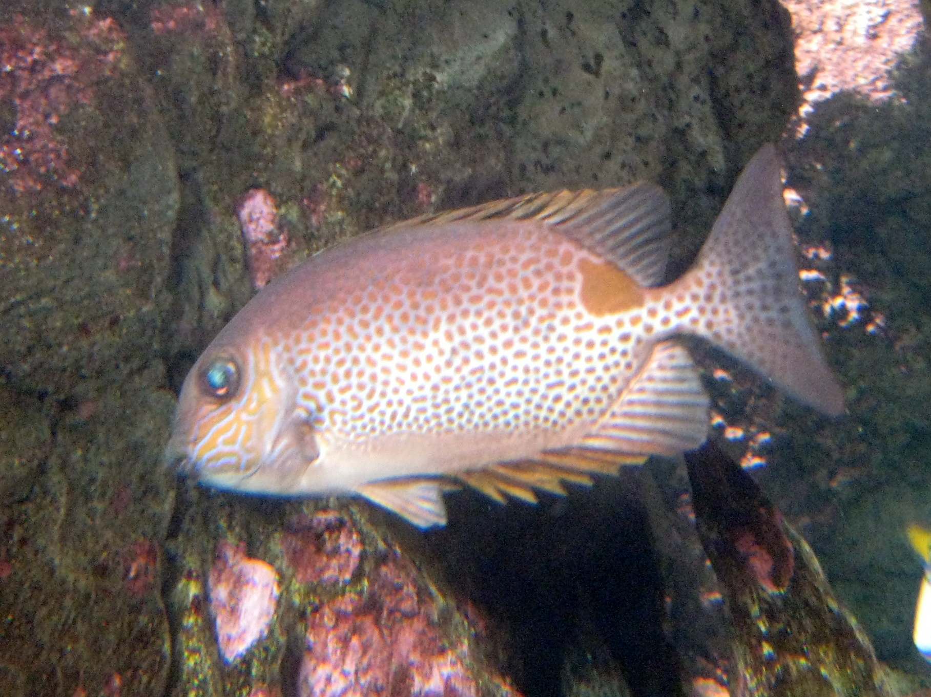 Siganus guttatus à l'aquarium Cinéaqua